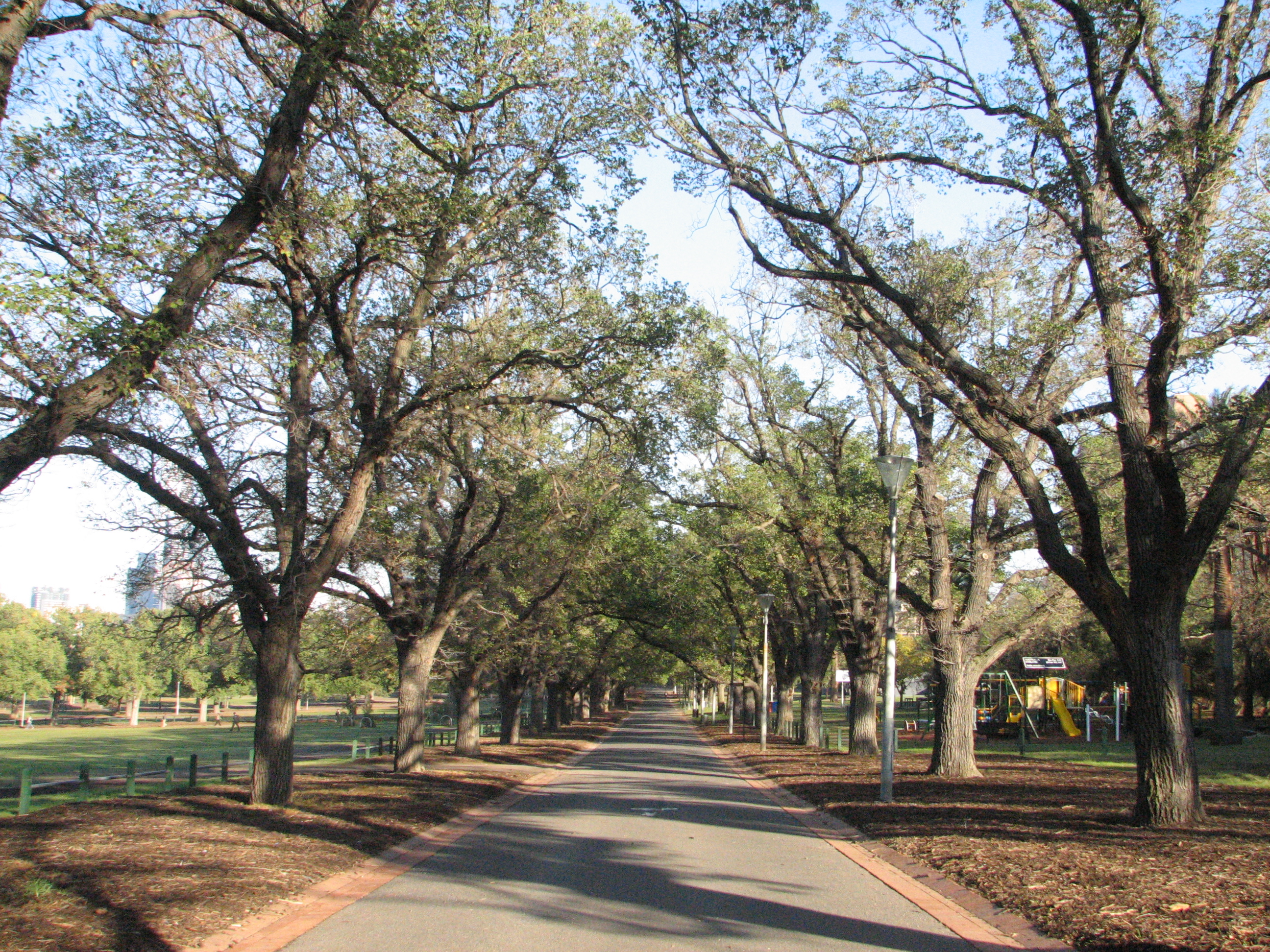 Yarra Park